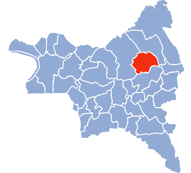 Auteur Hervé SUAUDEAU Licensing Catégorie:Cartes de Seine-saint-Denis